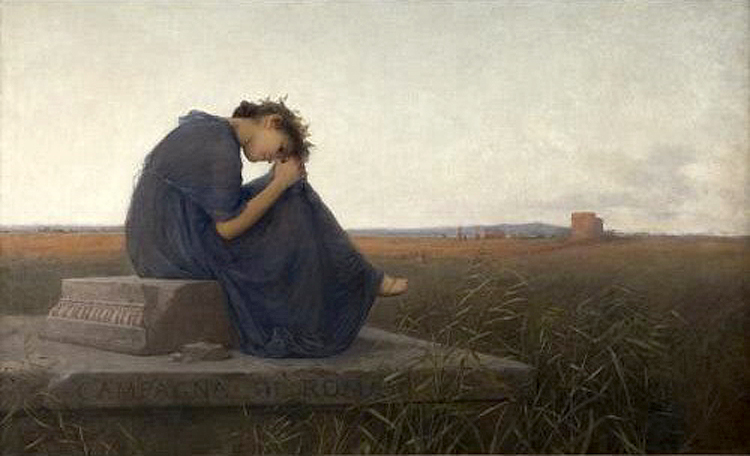 Campagna di Roma. Grabmal der Caecilia Metella, 1894